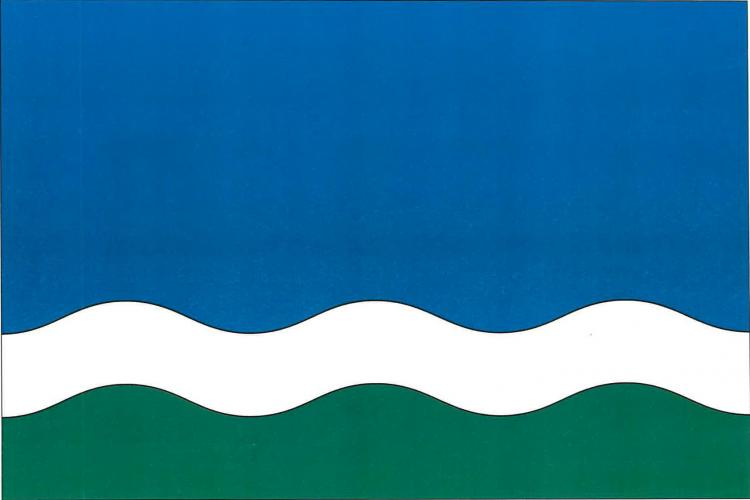 Svépravice vlajka